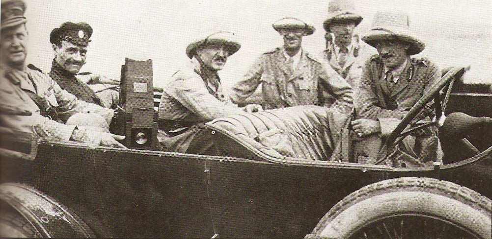 Dunsterville(far left) and staff of Dunsterforce